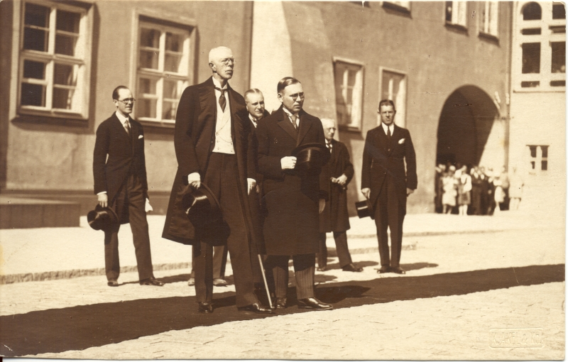 Rootsi kuningas Gustav V Tallinnas